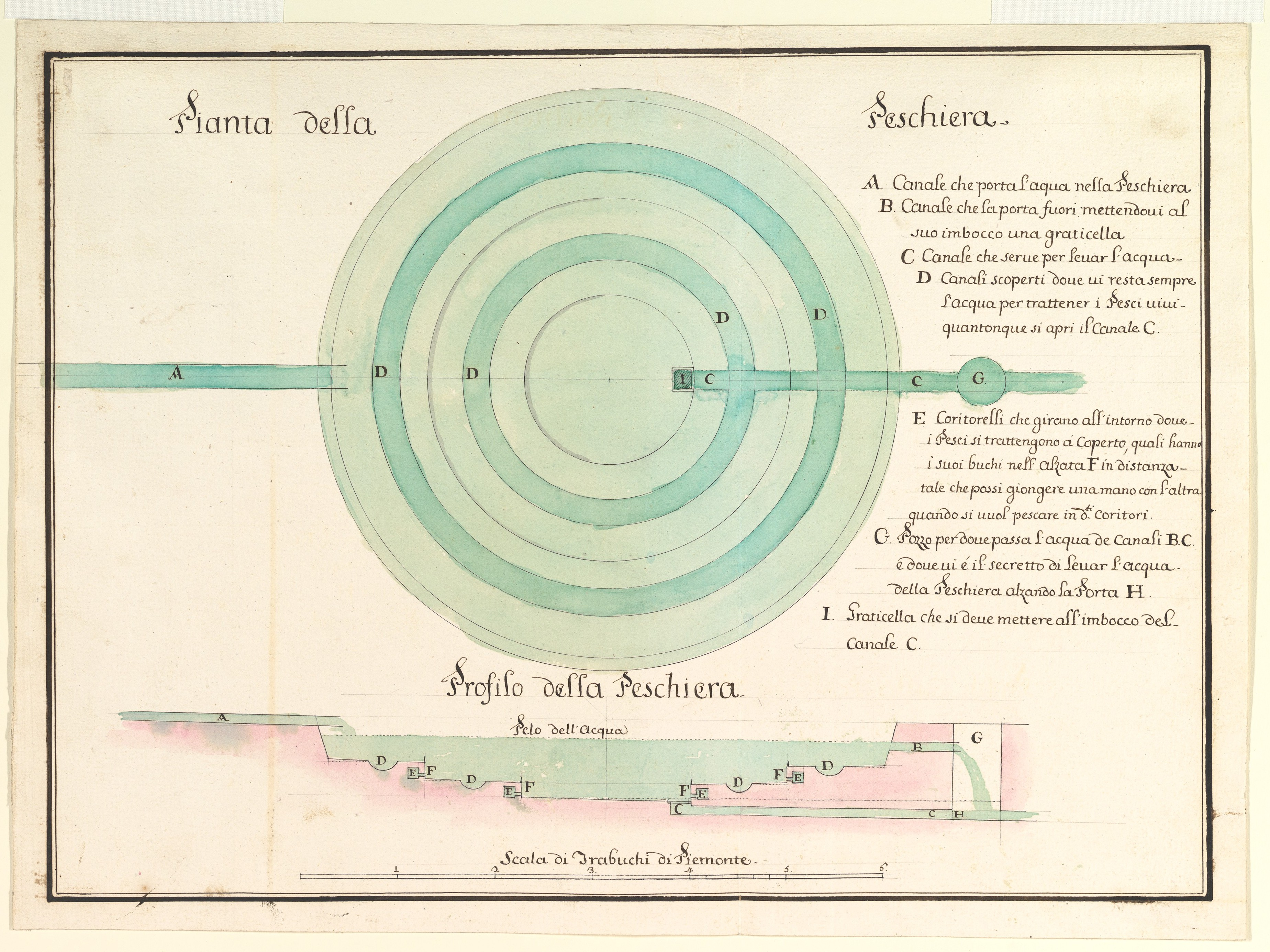 Drawing; Drawings